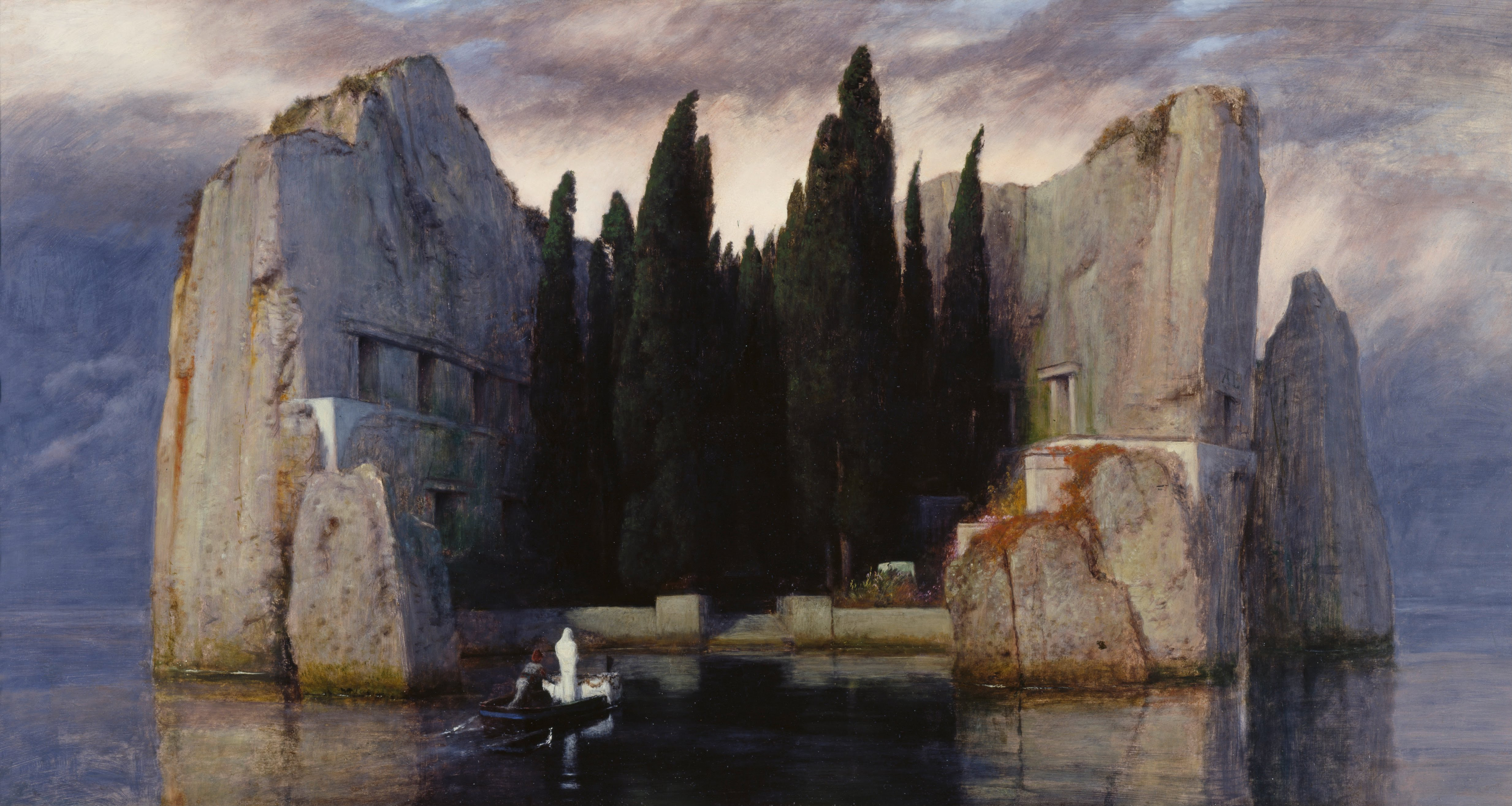 3rd version